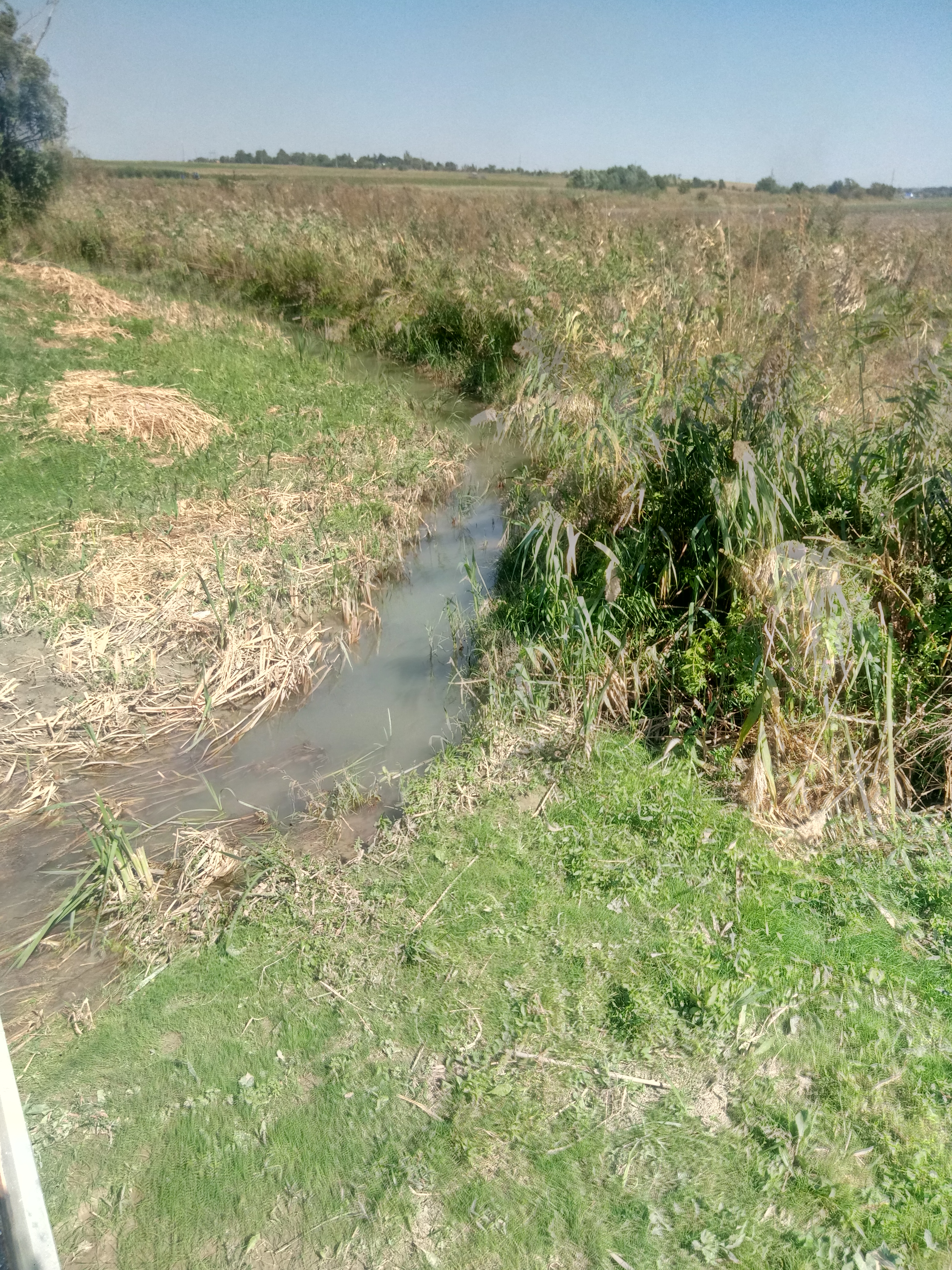 река Уташ